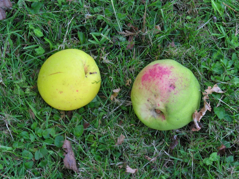 Marmelos en Bastavales, Brión